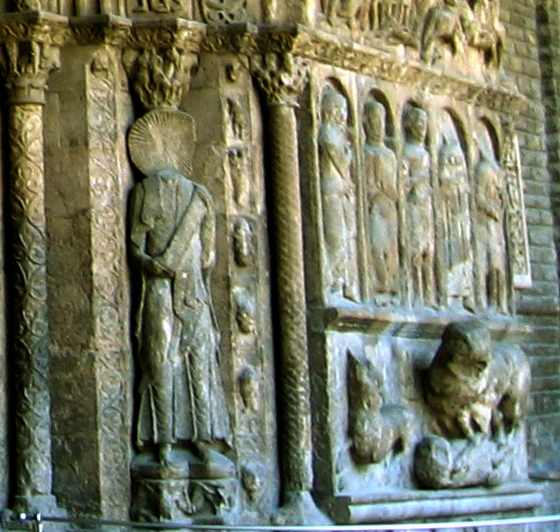 Pórtico de Ripoll imagen de San Pablo